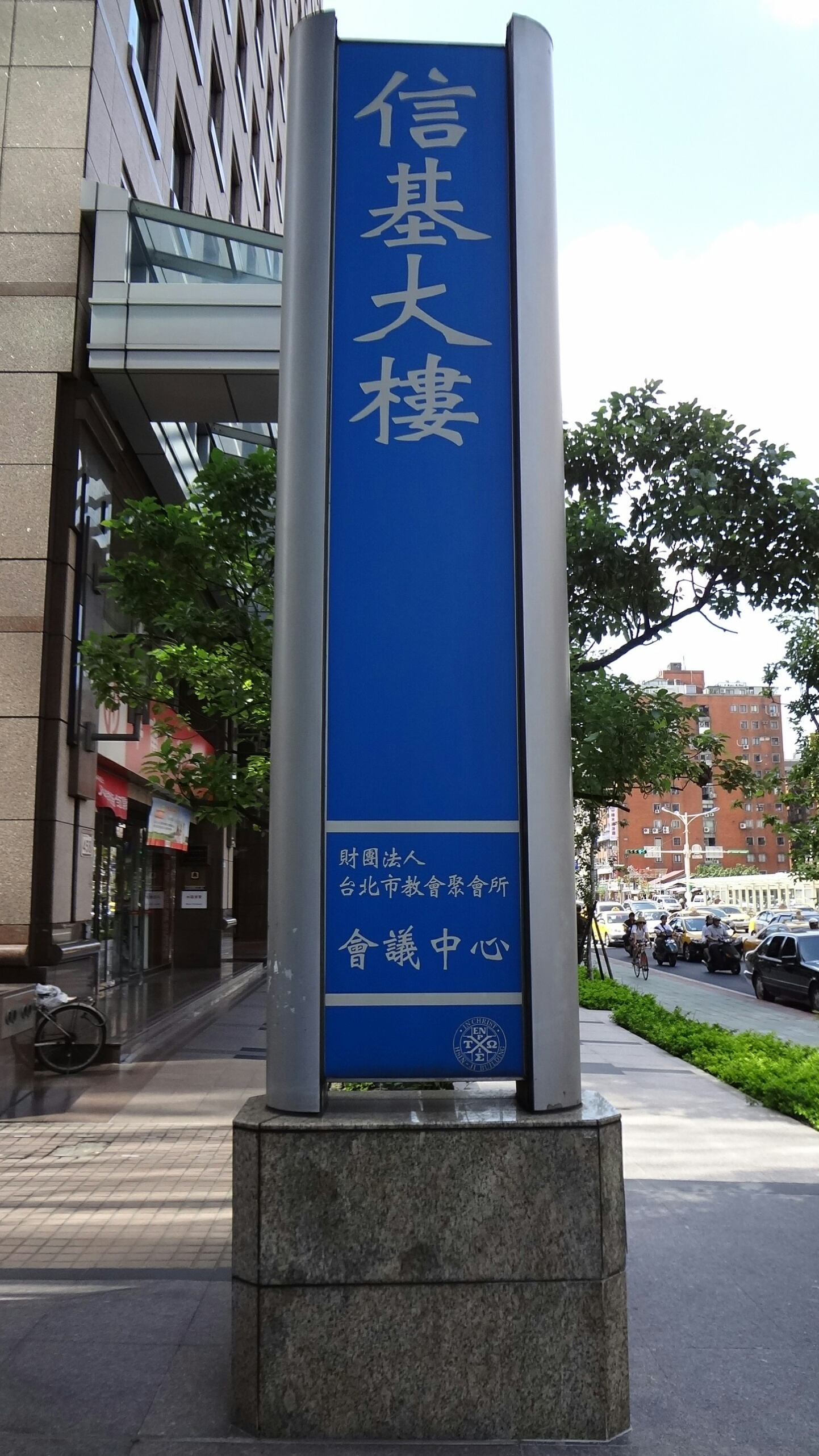 臺北市信義區信義路四段，信基大樓招牌。